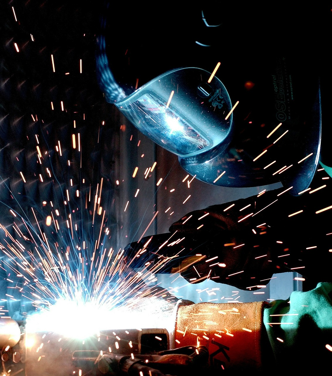 Selon la notion de salaire d'efficience, la productivité dépend du salaire.